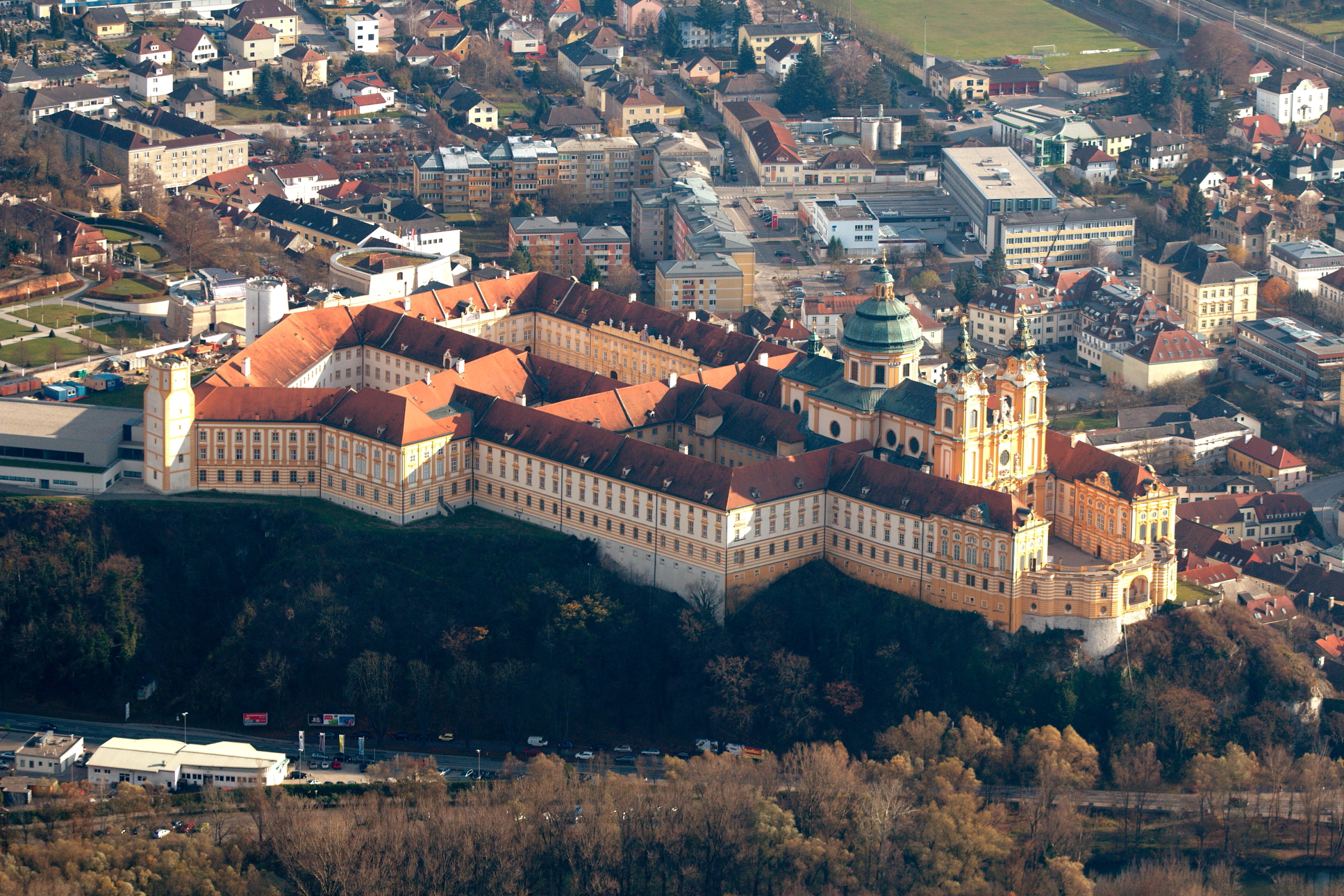 Melk Abbey